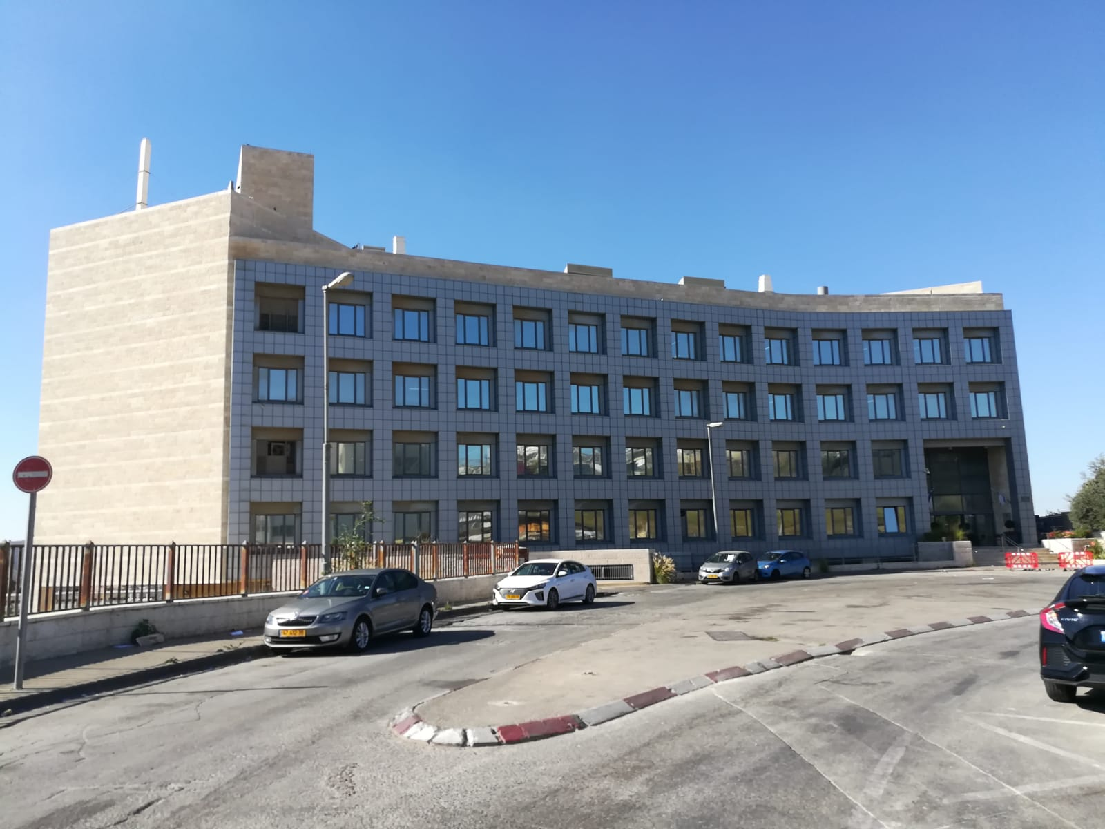 בניין מעבדות מרכזיות ומכון לביקורת ותקנים של חומרי רפואה, ירושלים